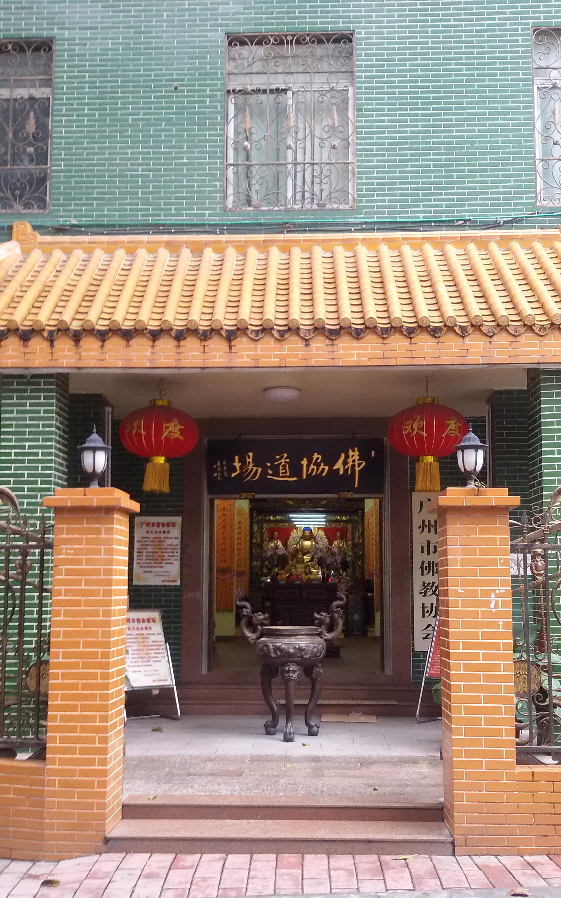 粵語: 佛協道埸嘅門口，廣州市佛教協會就響呢度。